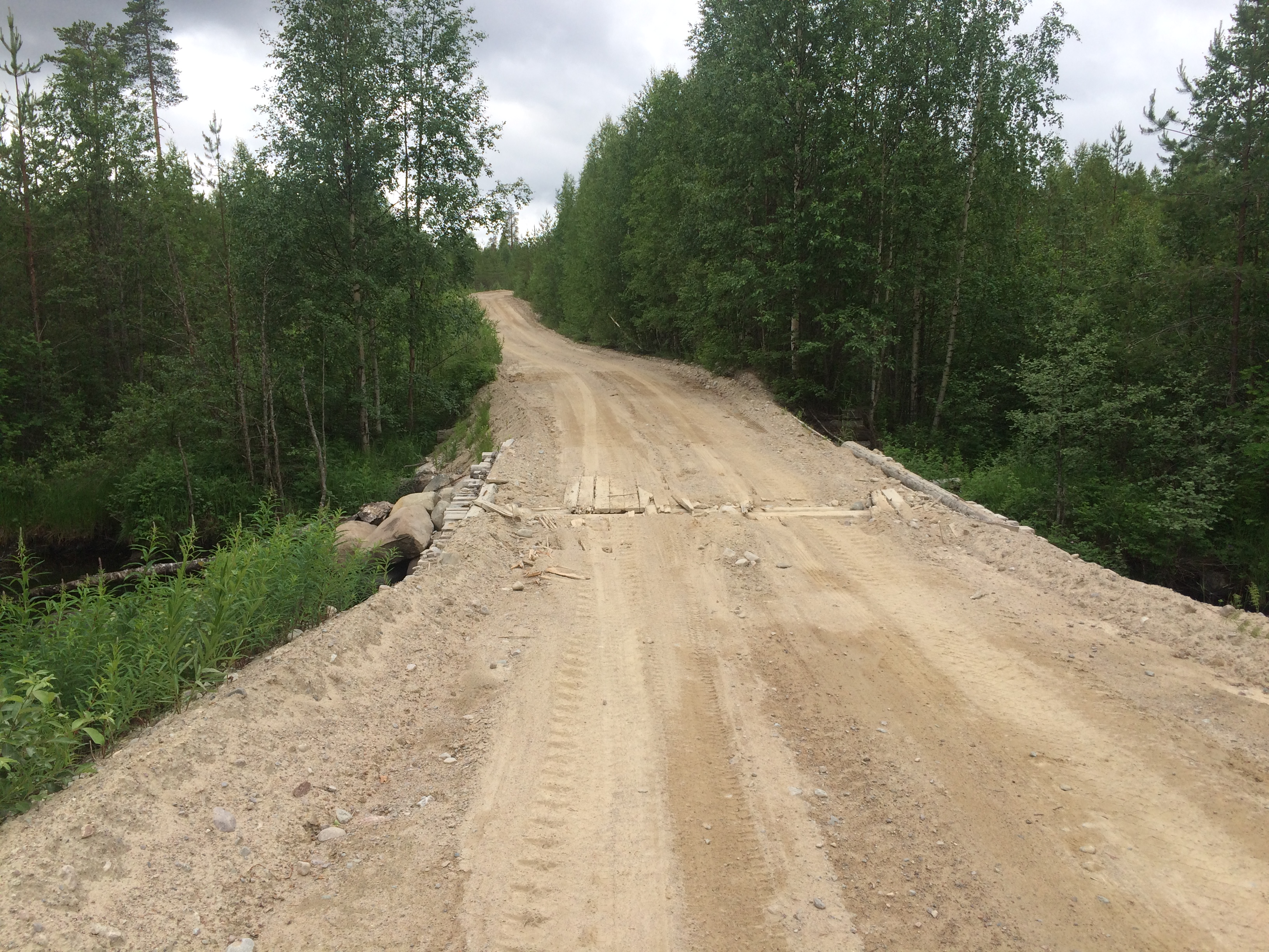 Тянукса (река, впадает в Выгозеро)